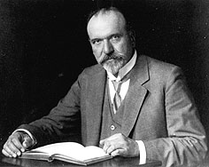 Theodor Liebisch